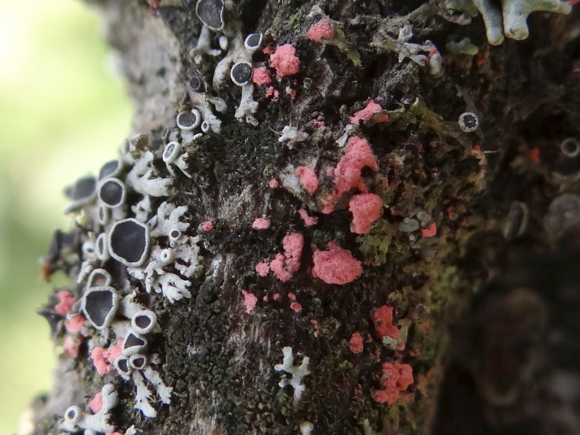 llosporiopsis christiansenii parasite on Physcia stellaris (location: Slovakia, Osturnia)